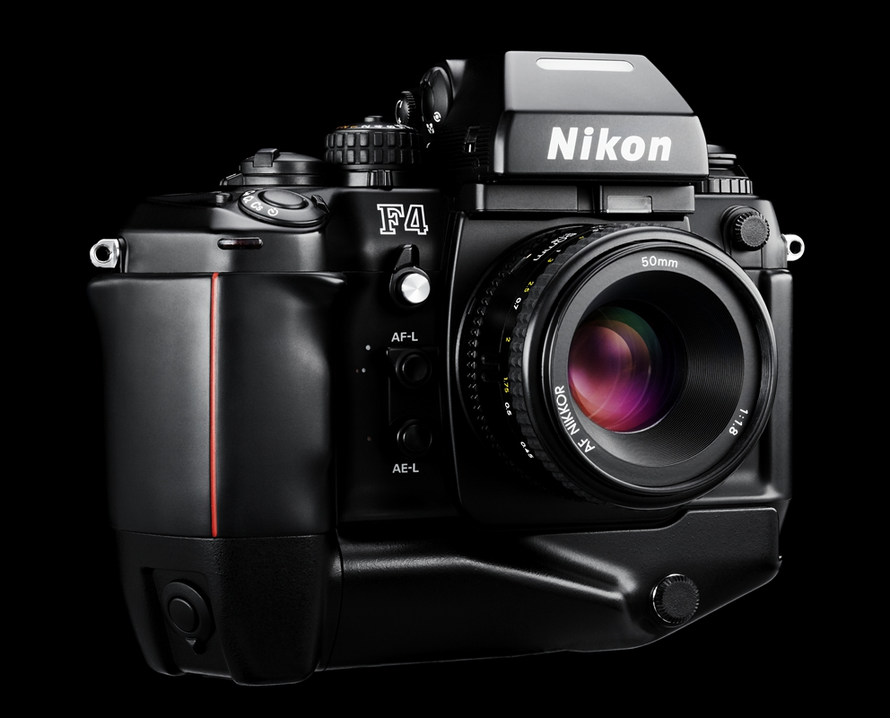 Nikon F4 F4s Camera